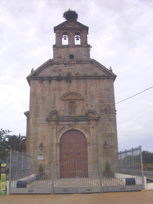 Ermita de Nuestra Señora de los Remedios, en Villafranca de Córdoba (Córdoba) Autor: Rafaelji. Tomada: 9-abril-2004. Cámara digital RICOH, 1 megapixel.